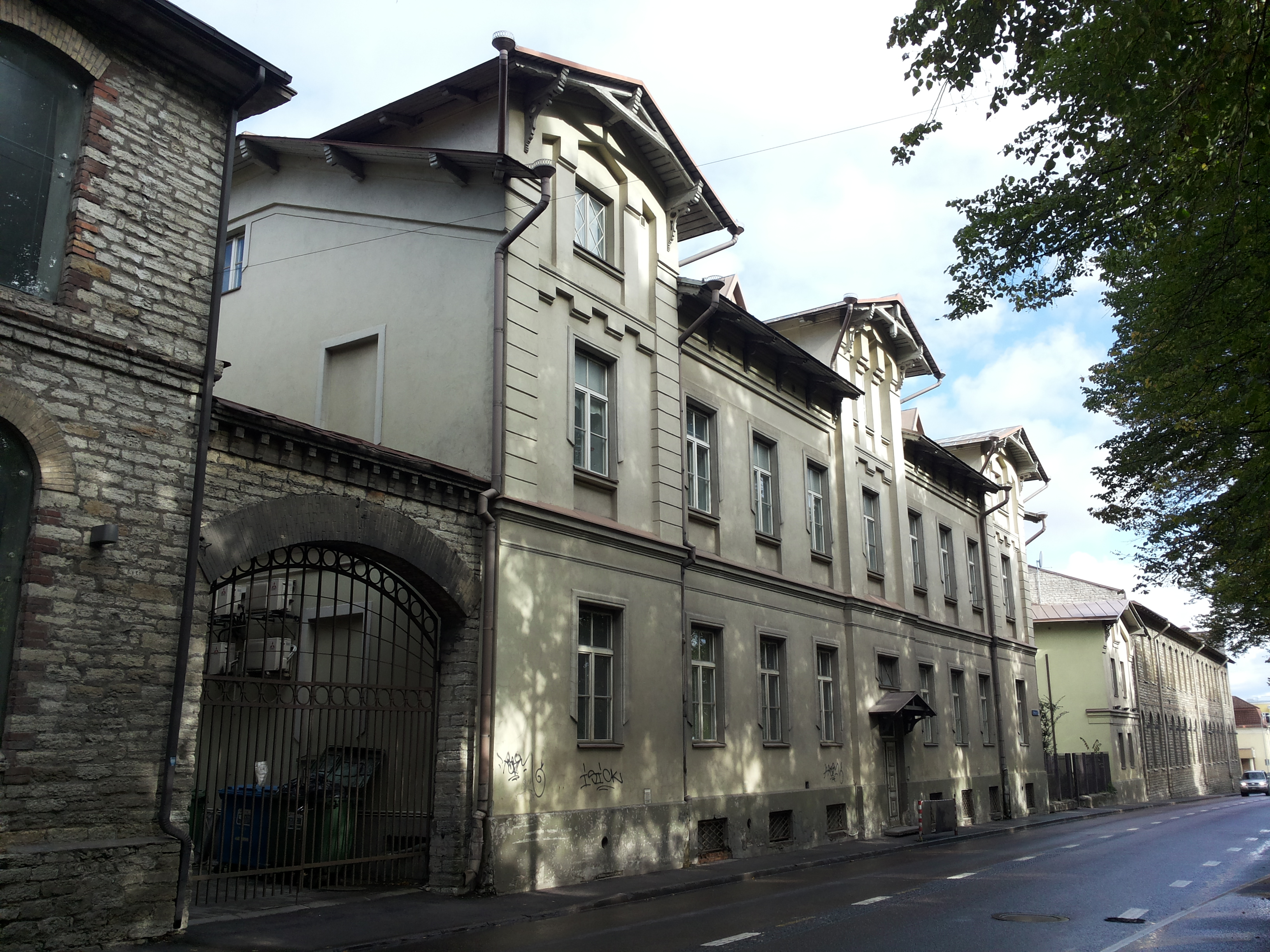 P. Wiegandi masinatehase administratiivhoone, 1881–1883